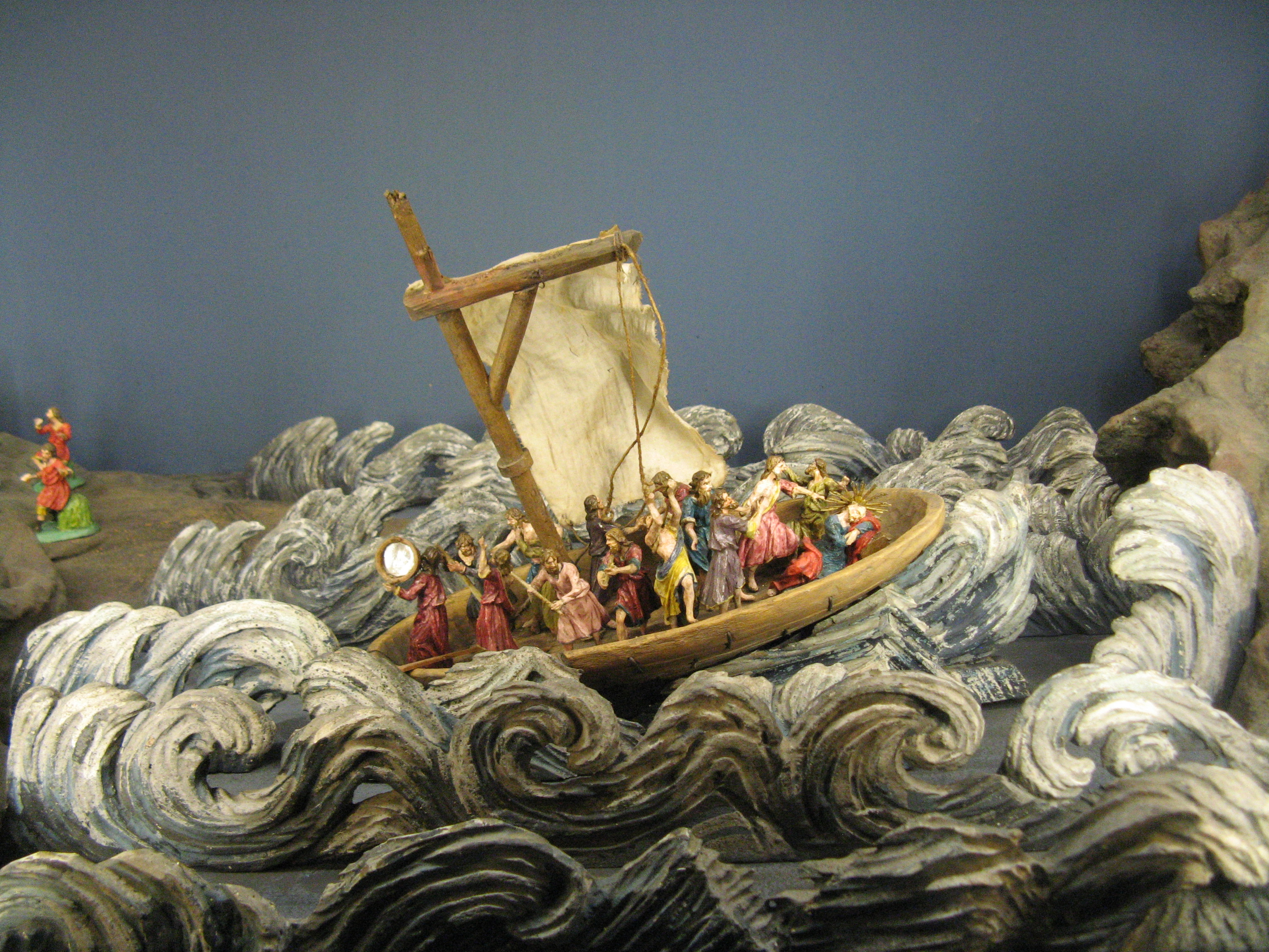 Augustin Alois Probst: Sturm auf dem See Genezareth, Krippenmuseum Brixen